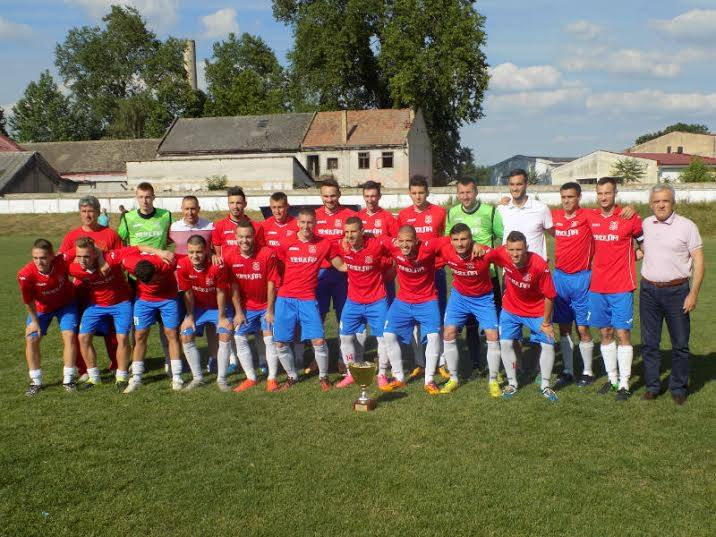 Prvaci Srpske lige za sezonu 2015/2016